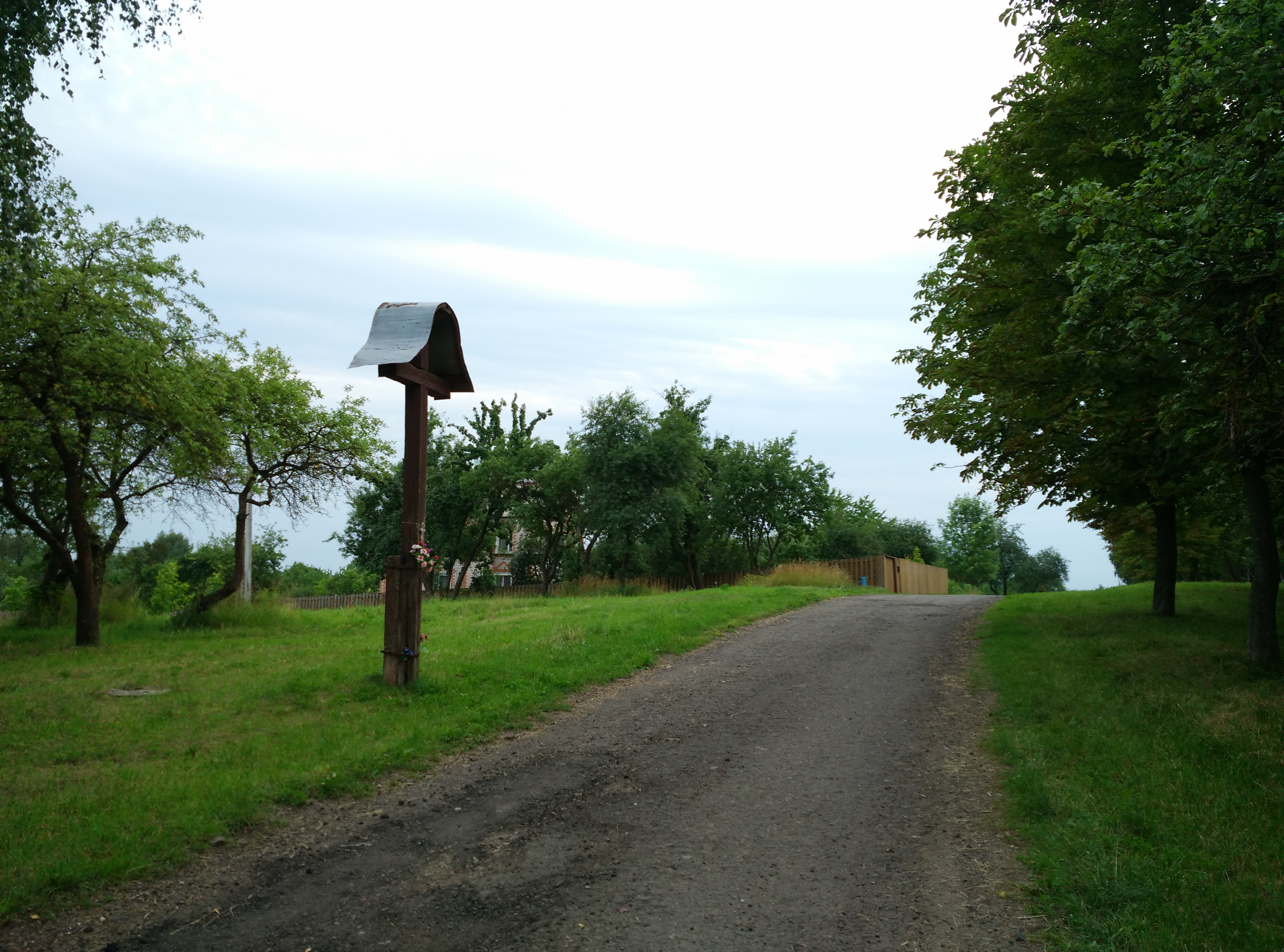 Вёска Маляўкі, Менск. Вуліца Маляўкі.